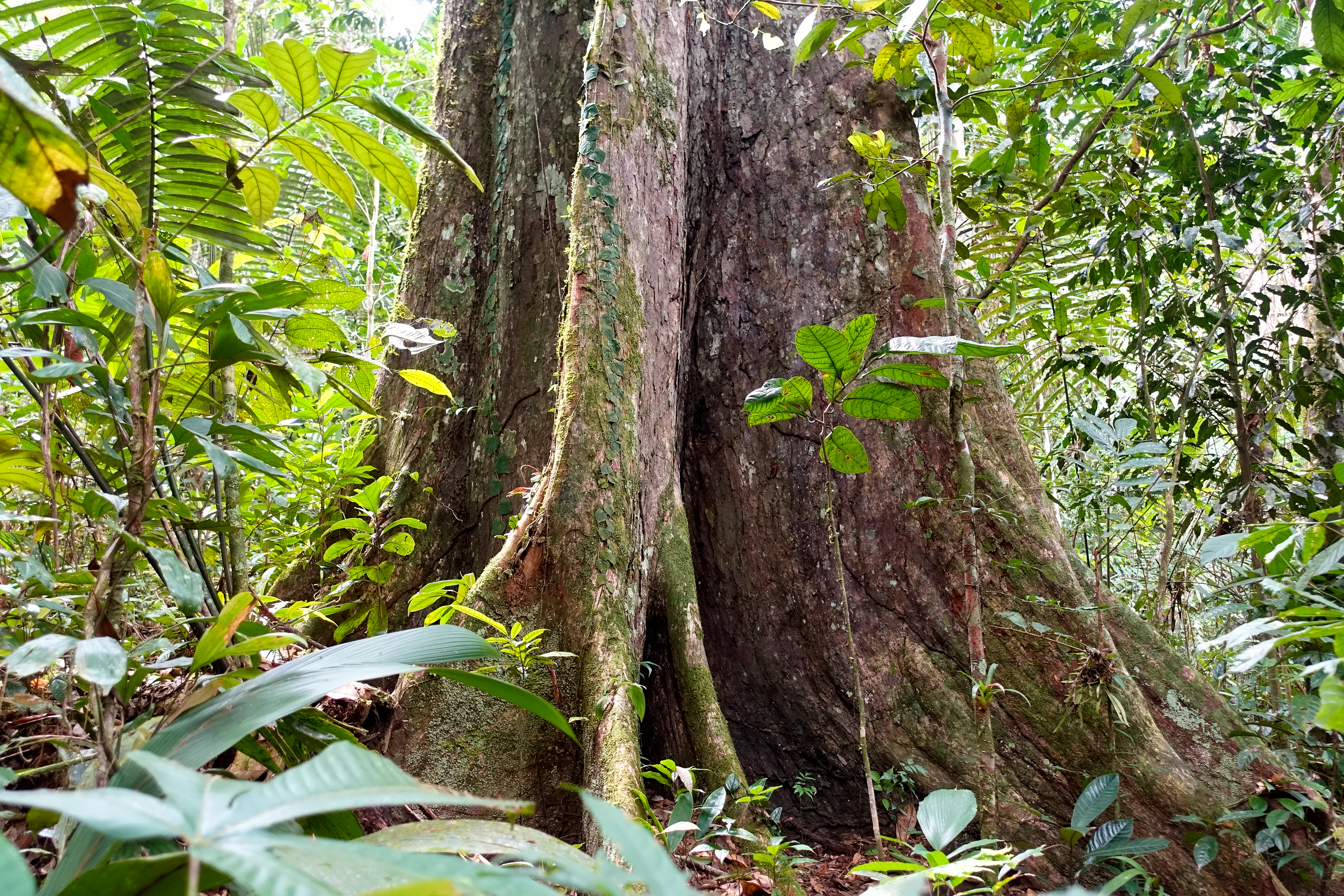 Brettwurzeln eines Urwaldriesen (ggf. Kapok) im Cuyabeno Wildtier-Reservat, Ecuador